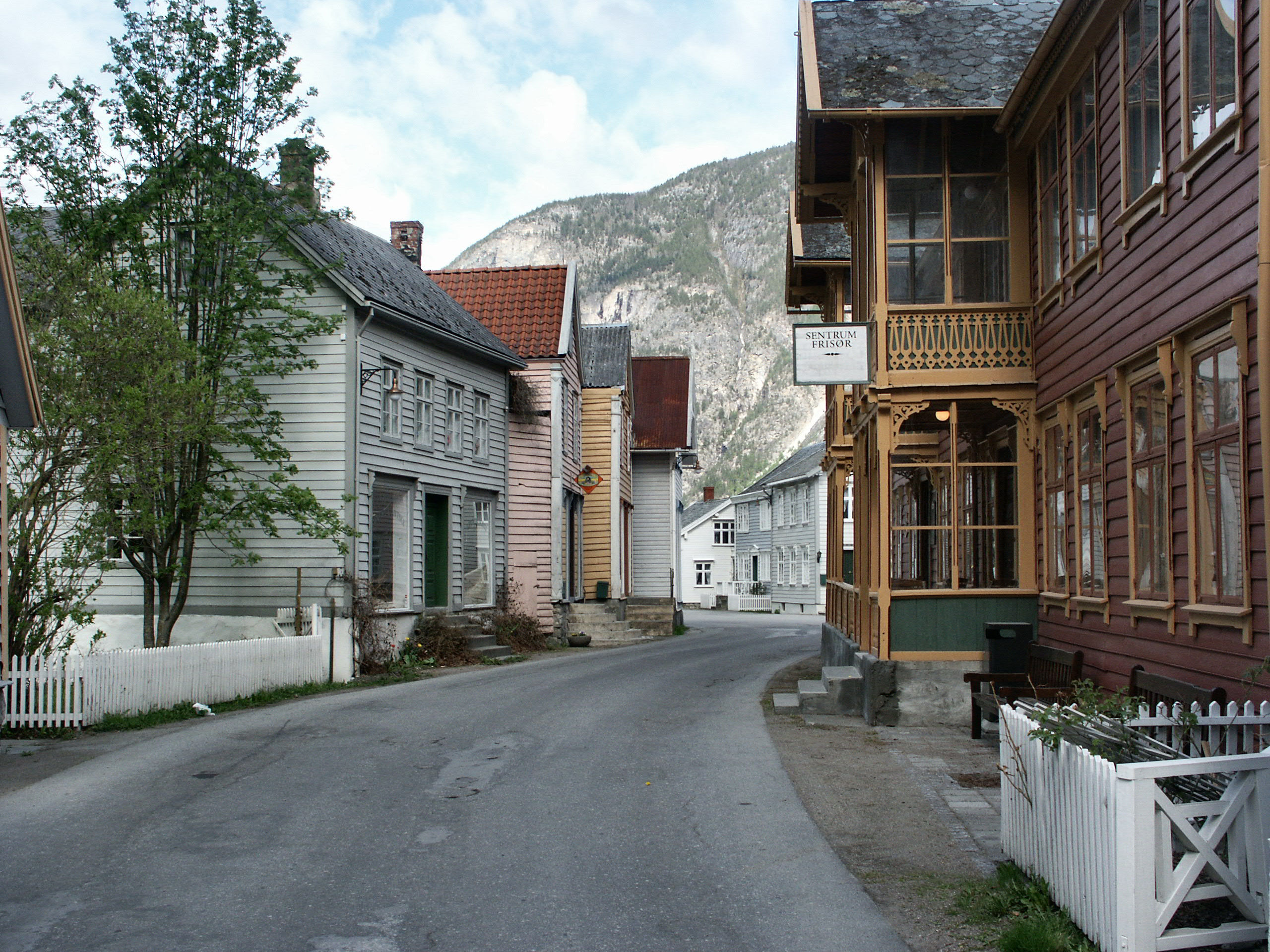 Laerdalsoeyri, Sognefjord. 1700-houses